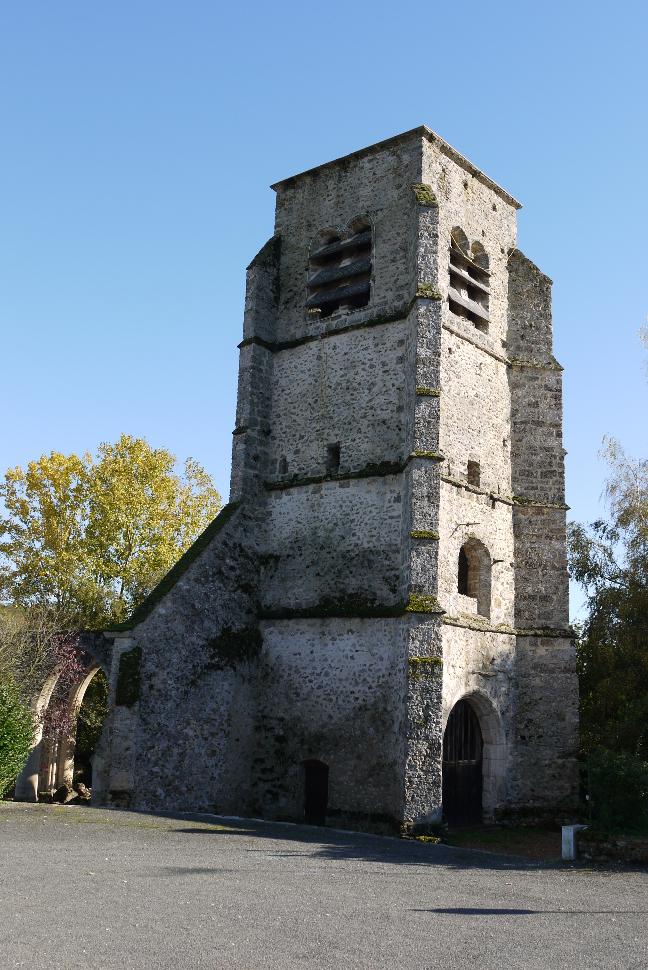 Église Saint-Cyr-et-Sainte-Julitte de L'Épine-aux-Bois